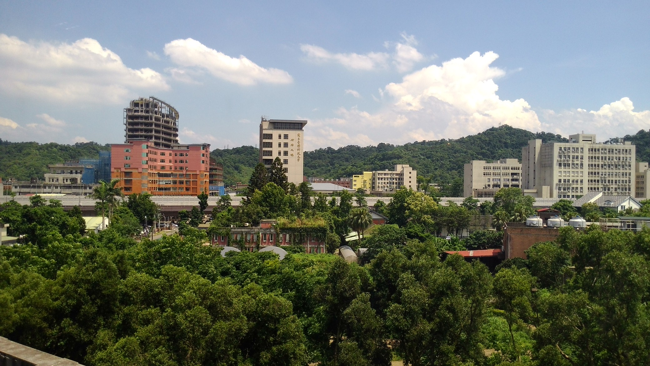 中文（台灣）: 國立臺灣科技大學。